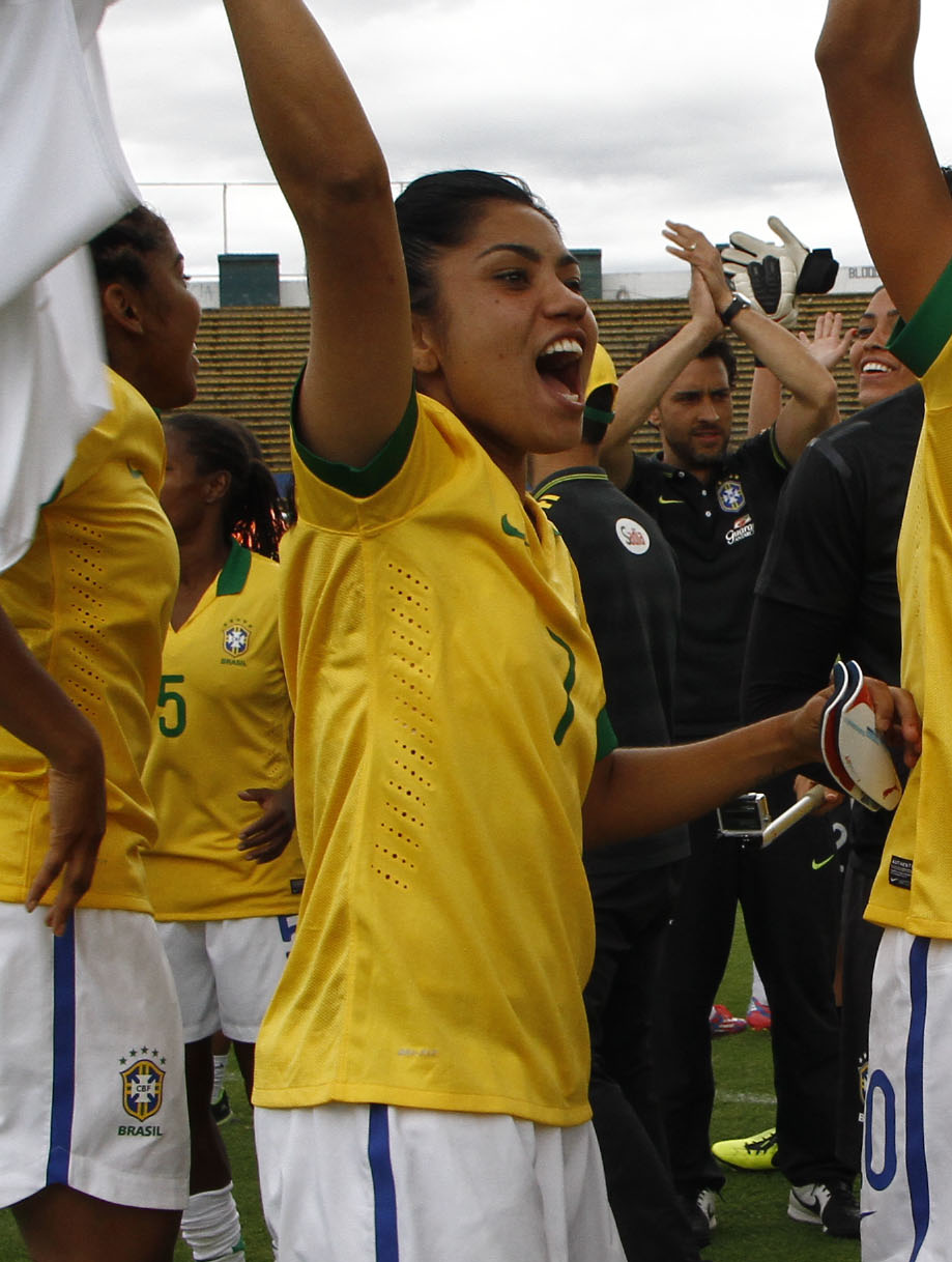 Quito, 28 sep (Andes).- La selección brasileña femenina de fútbol se proclamó Campeona de la Copa América de Fútbol Ecuador 2014. Foto: Micaela Ayala V./Andes